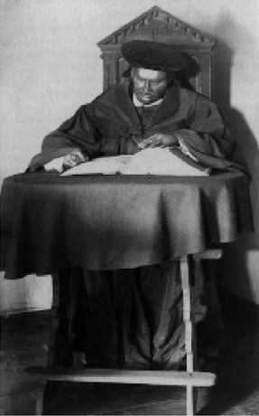 Luther in effigie. Wachsfigur Luthers, die in Halle bis in die 1930er Jahre gezeigt wurde.